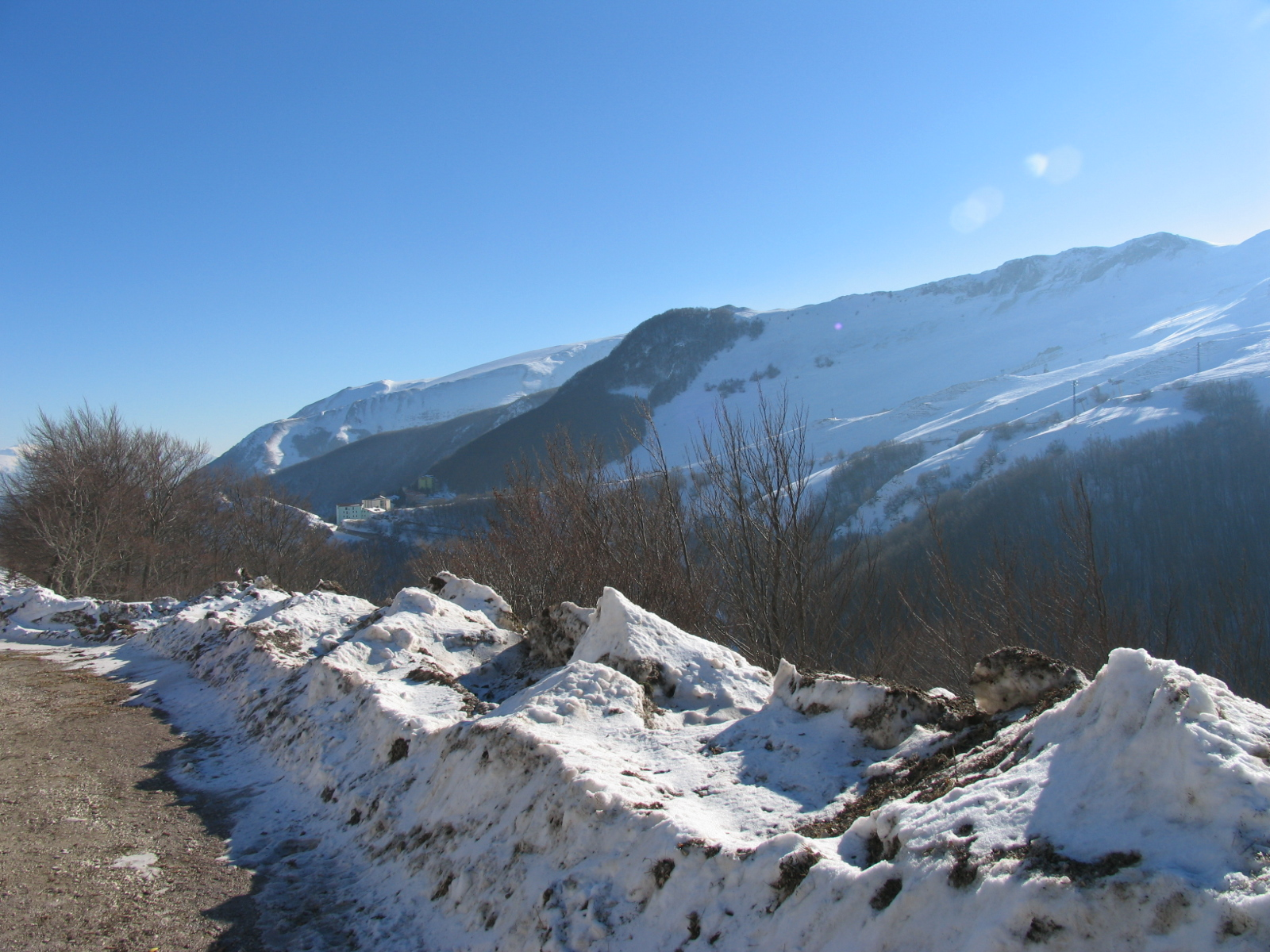 un’importante stazione sciistica dell’Appennino Umbro-Marchigiano, in località Sassotetto